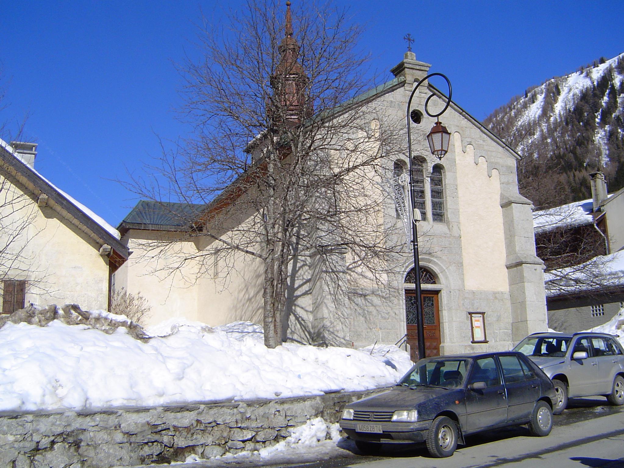 Photo prises dans la commune de Chamonix-Mont-Blanc en France